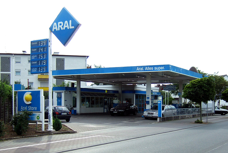 Aral Tankstelle in Weiterstadt